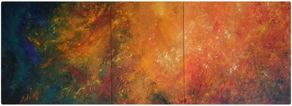 Triptychon, 320 x 120 cm, Öl auf Leinwand